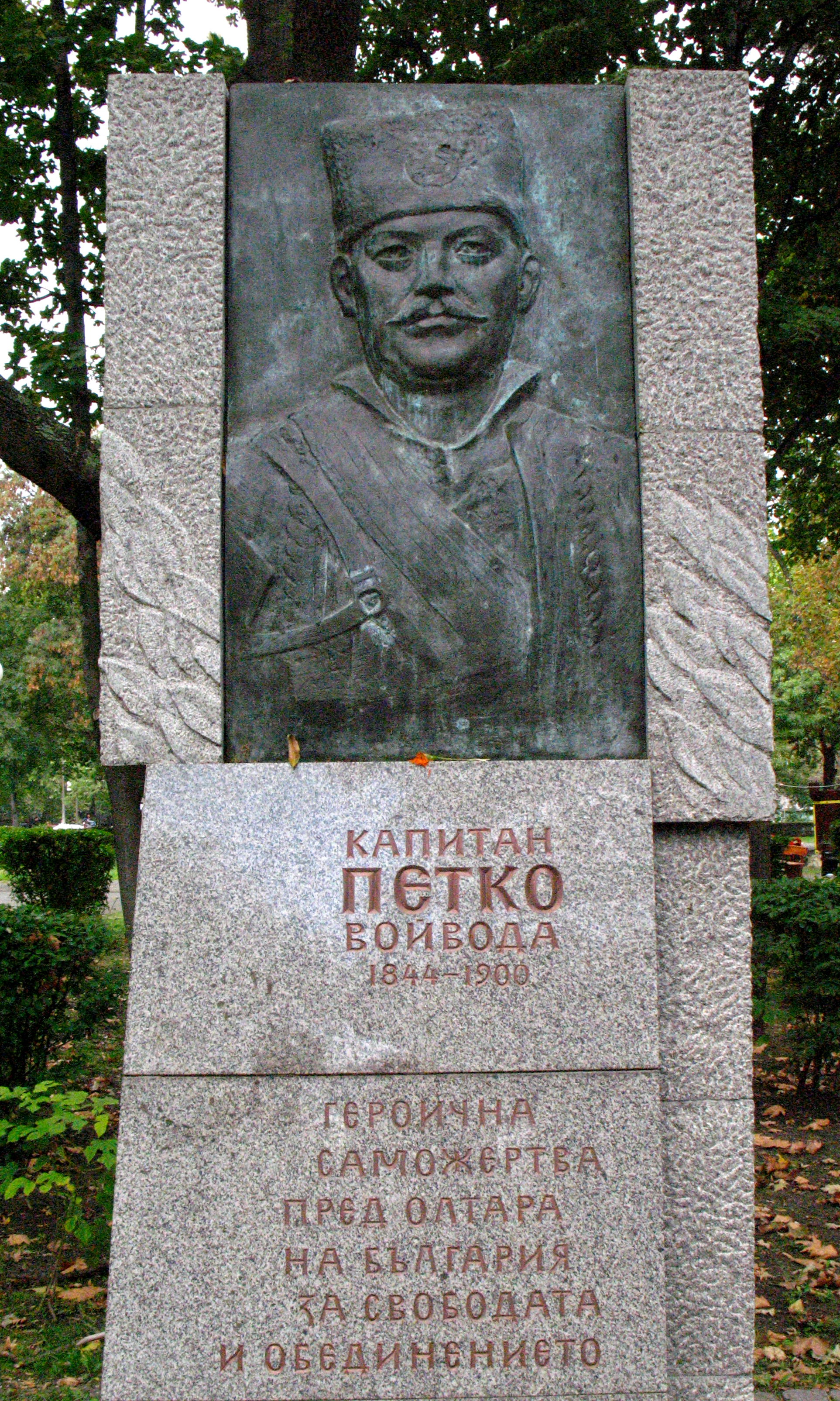 Паметник на Петко войвода в Бургас.